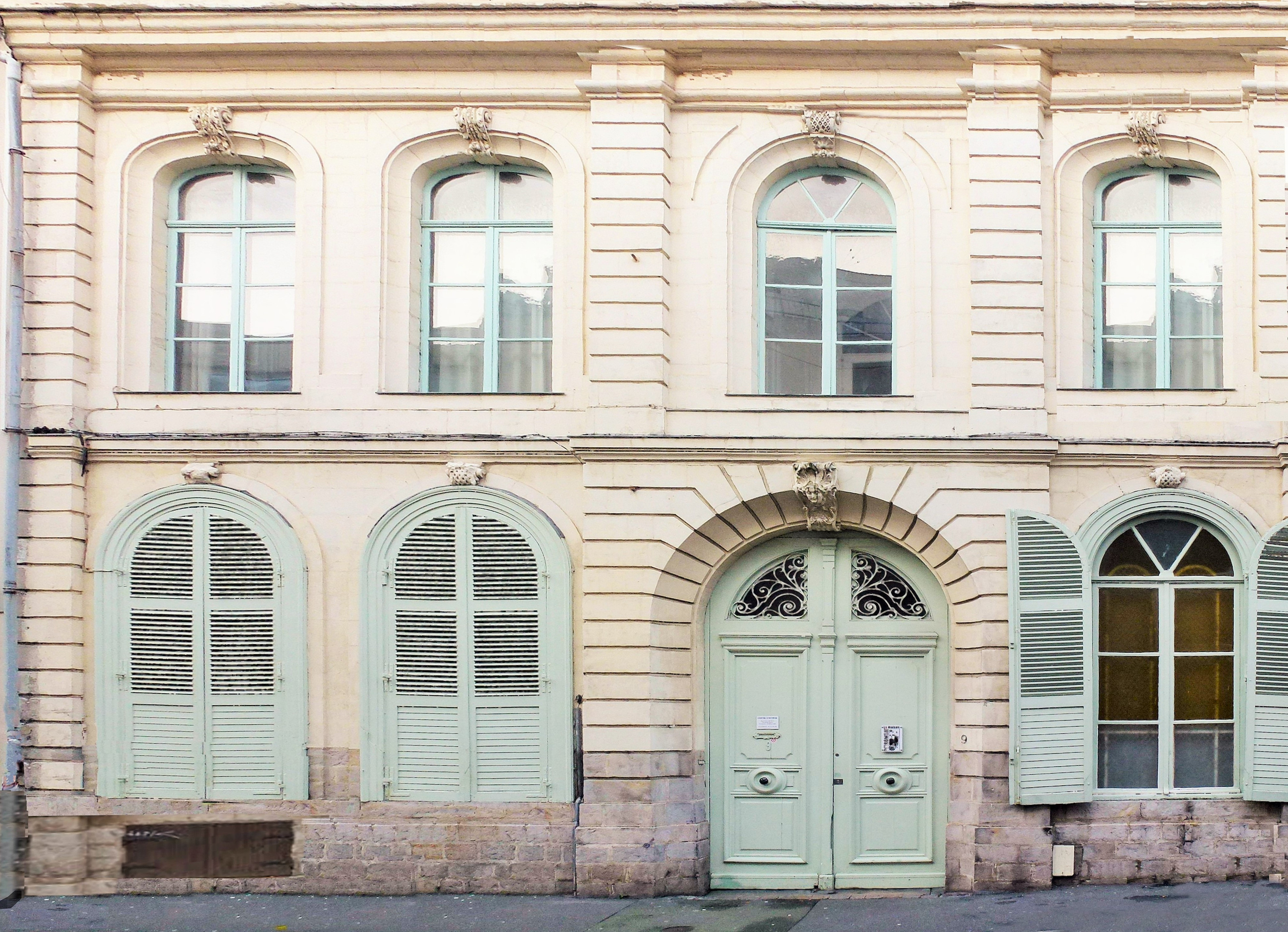 9, Rue À Fiens Lille Nord (département français) .